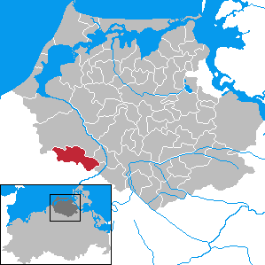 Dettmannsdorf in Mecklenburg-Vorpommern - District Nordvorpommern